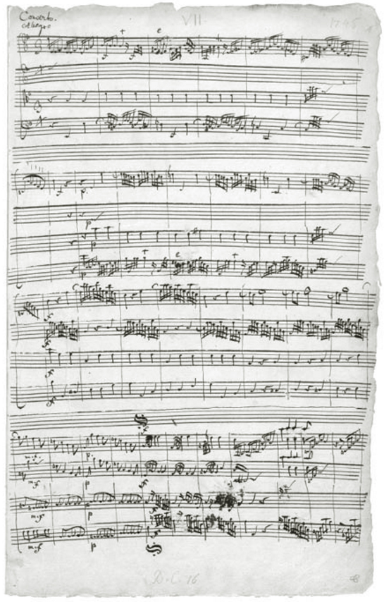 Manuscrito do concerto para teclado em mi menor Wq 15